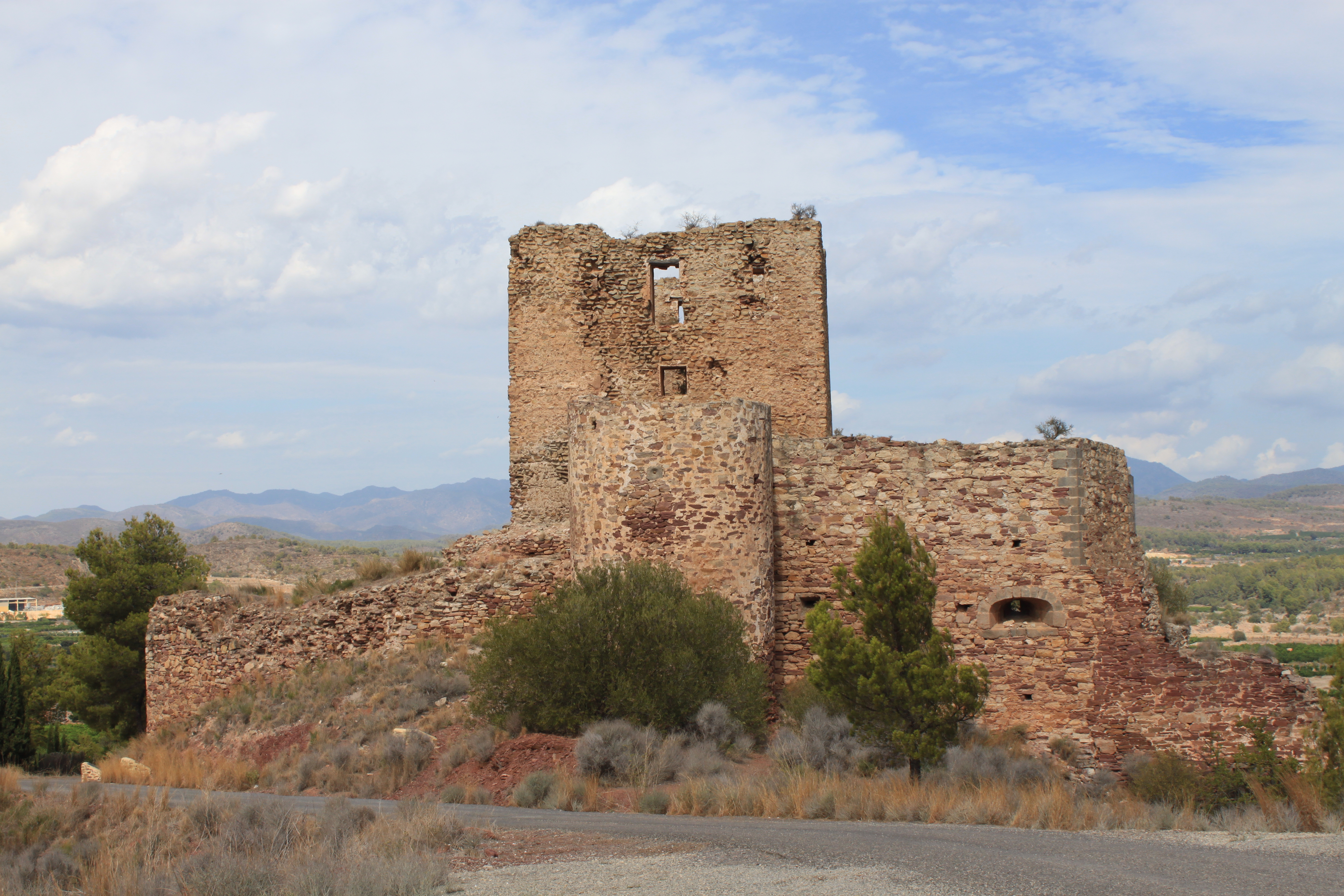 Castillo de Torres Torres. Torres Torres, provincia de Valencia, Comunidad Valenciana, España.